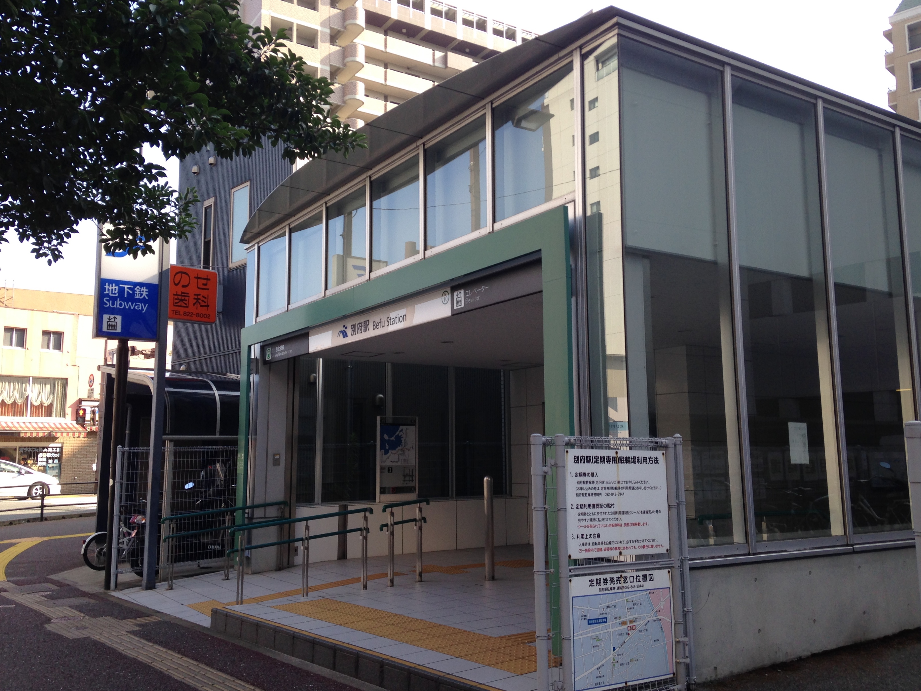 別府駅(福岡市営地下鉄)の3番出入り口